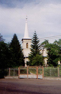 Tiszaújlaki református templom (Kárpátalja, Ukrajna)